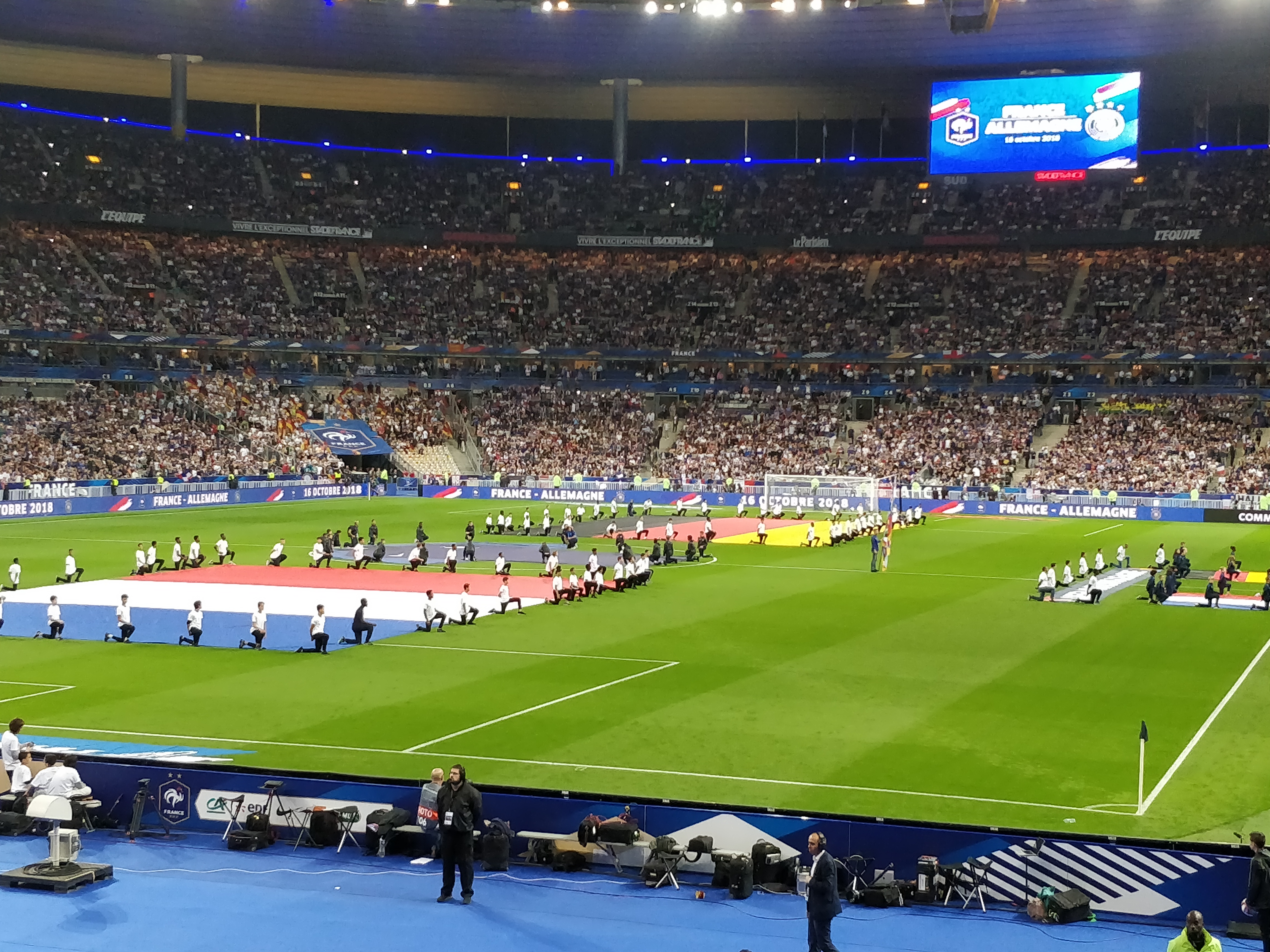 Match de football France-Allemagne - 16 octobre 2018 - Drapeaux